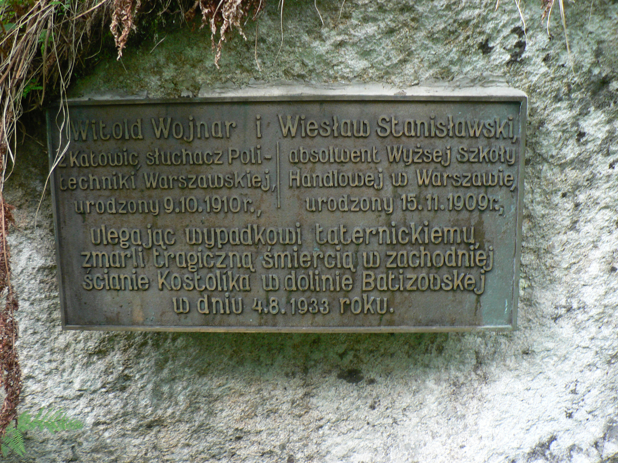 Symboliczny cmentarz ofiar Tatr, tablica ku czci Witolda Wojnara i Wiesława Stanisławskiego